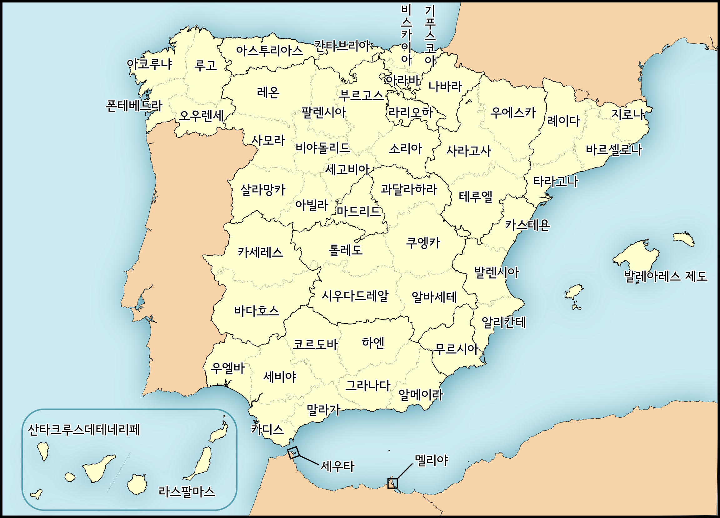 스페인의 도